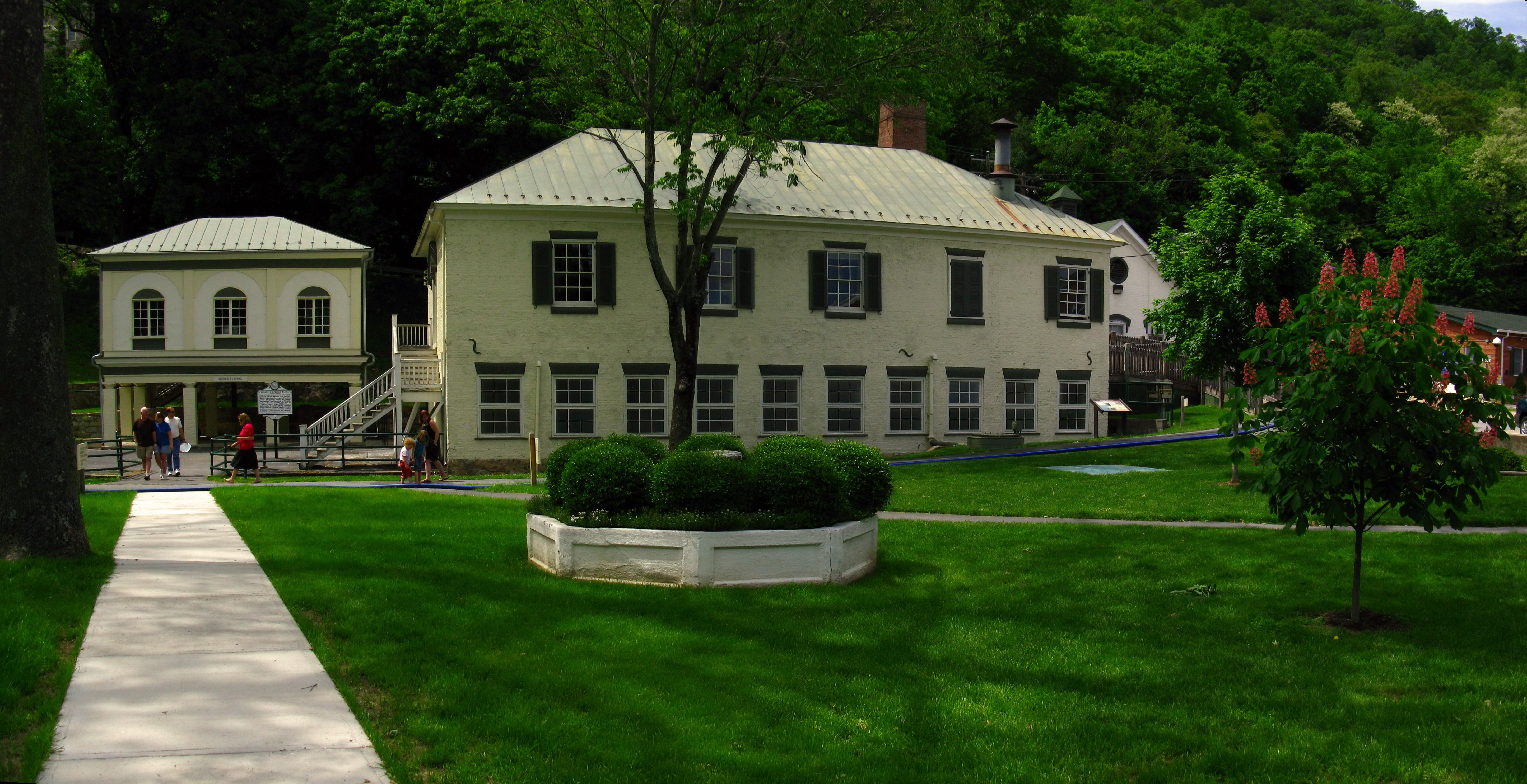 Berkeley Springs State Park, Bath (Berkeley Springs), West Virginia